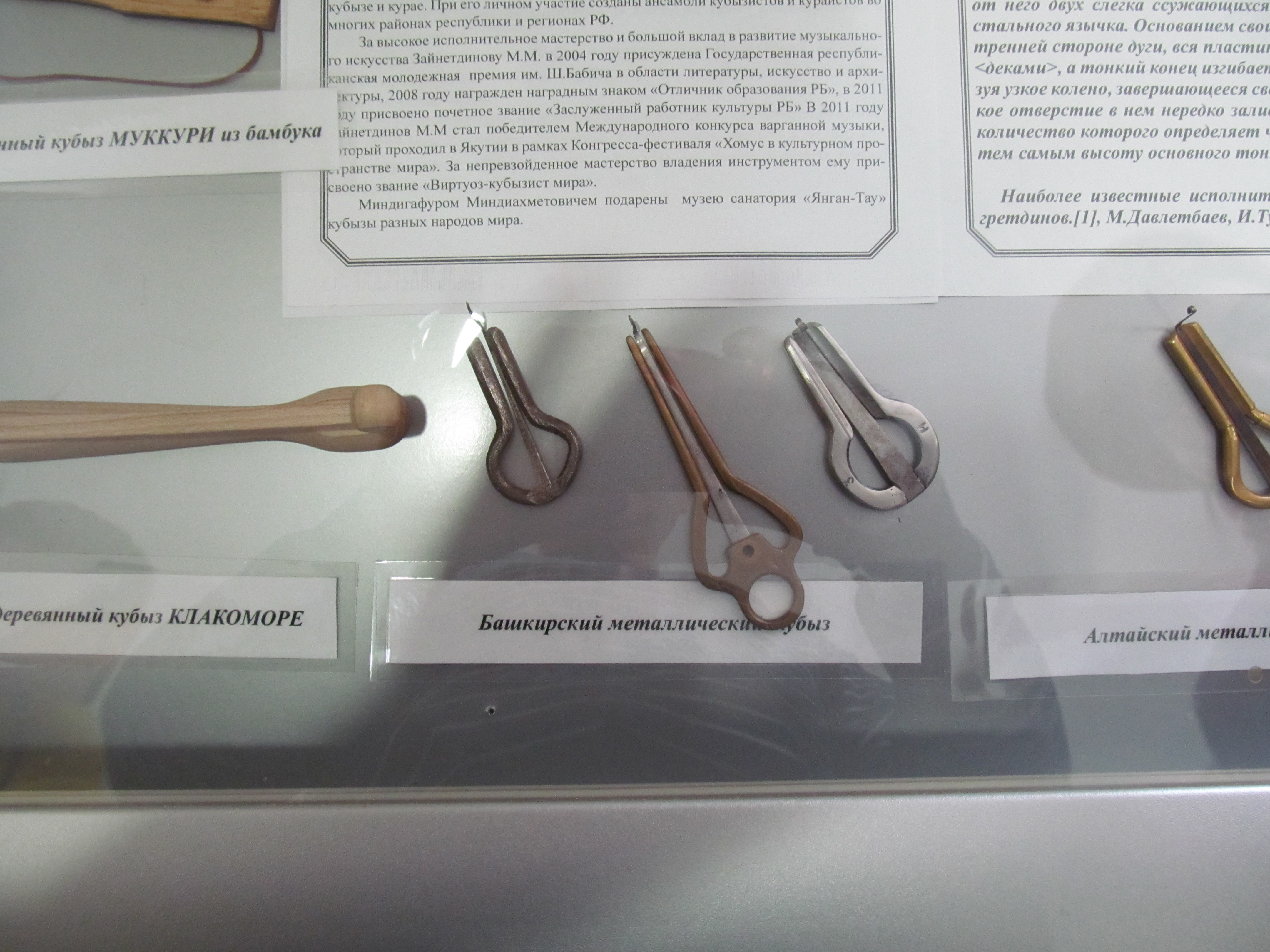 Вики-семинар Янгантау - 2016